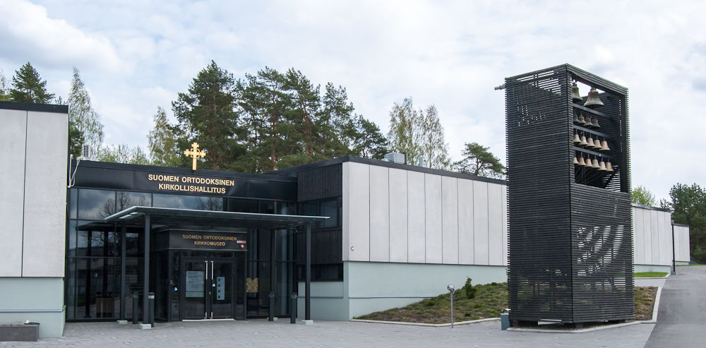 Suomen ortodoksinen kirkollishallitus ja Suomen ortodoksinen kirkkomuseo Kuopiossa keväällä 2012. Rakennus on valmistunut vuonna 1969, ja sen on suunnitellut arkkitehti Dag Englund.